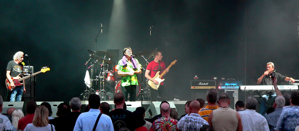 Ten Years After